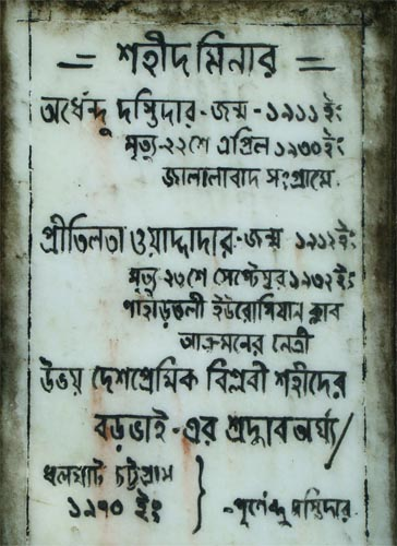 পূর্ণেন্দু দস্তিদারের নির্মিত শহীদ মিনারের নির্মান-কালীন খুদাই করা মার্বেল পাথরটিও মিনারের সাথে লাগানো।